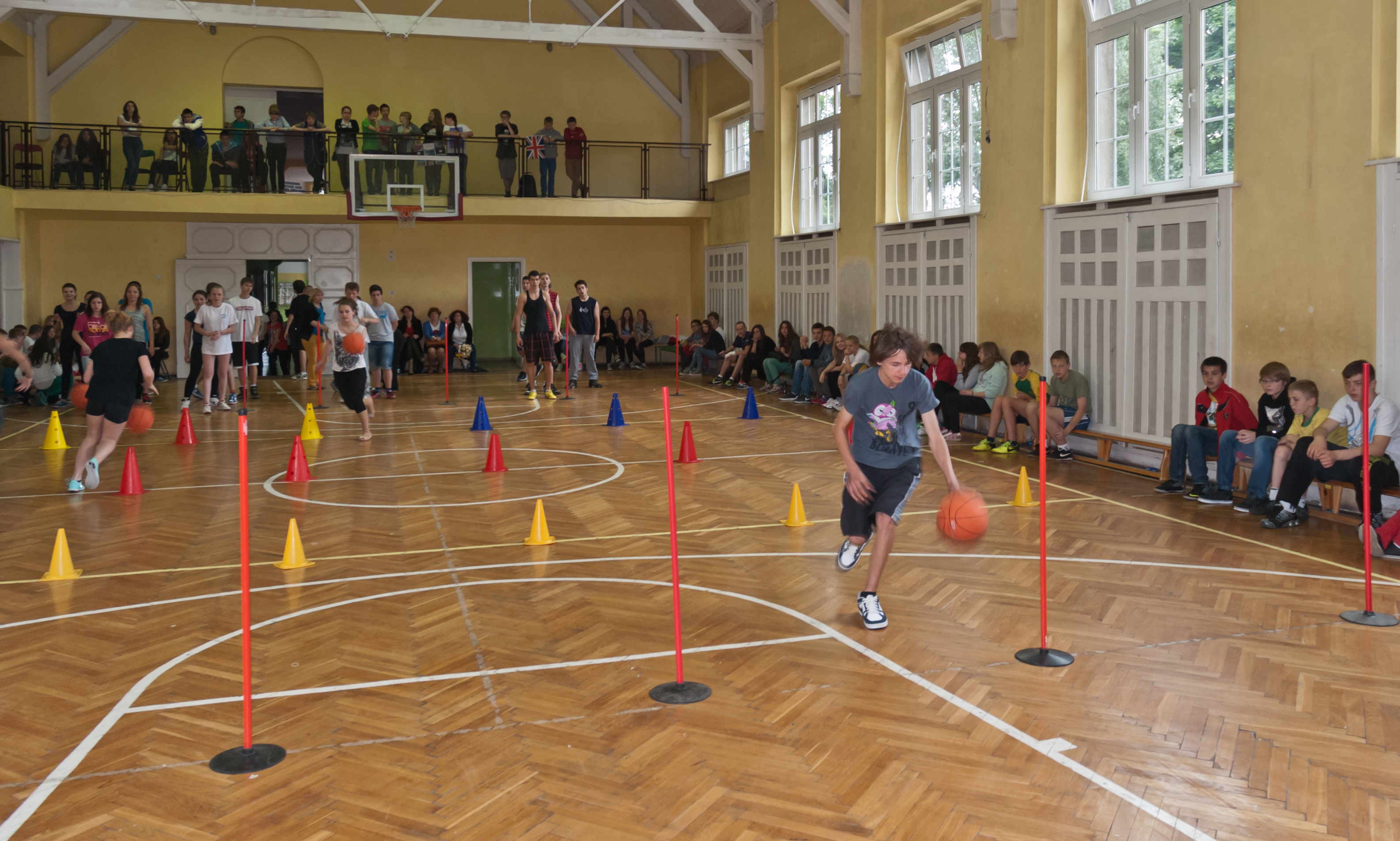 Zawody sportowe w sali gimnastycznej